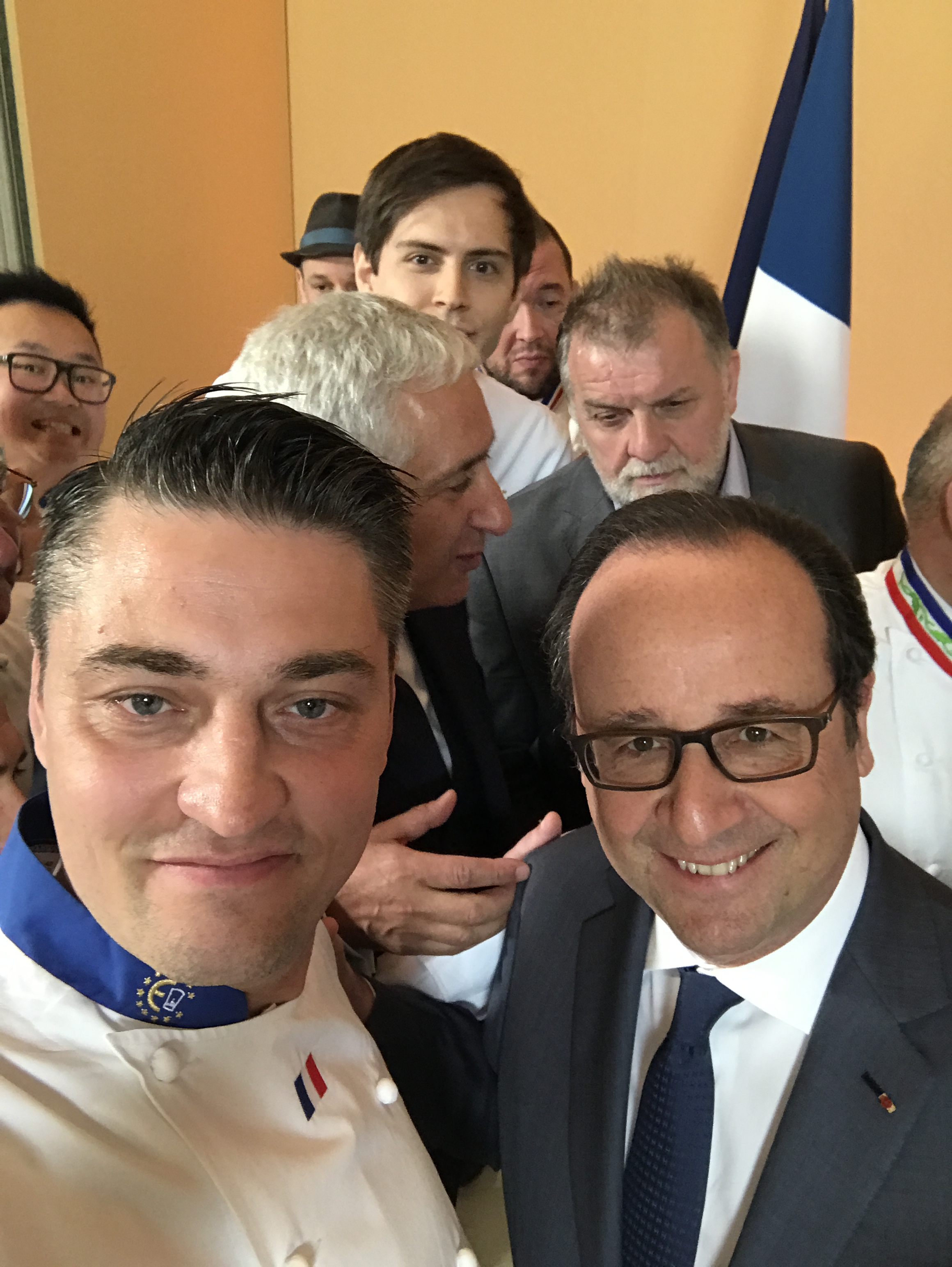 Philippe Geneletti et l'ancien Président